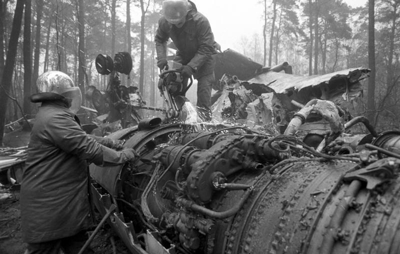 Berlin, Flugzeugunglück ADN-ZB/Mittelstädt/14.12.86/Berlin:Flugzeugunglück Ein Flugzeug vom Typ TU 134 der sowjetischen Fluggesellschaft Aeroflot ist am 12.12.86 in der Nähe von Bohnsdorf abgestürzt. An der Unglücksstelle wurde mit den Aufräumungsarbeiten begonnen.